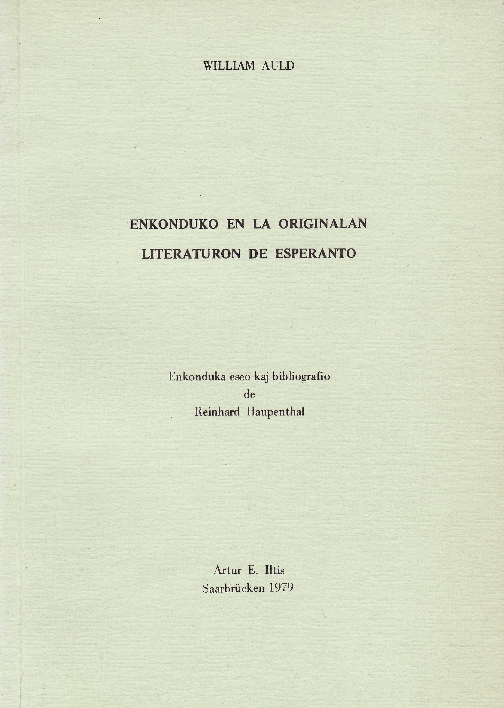 librokovrilo de "Enkonduko en la Originalan Literaturon de Esperanto", 1979